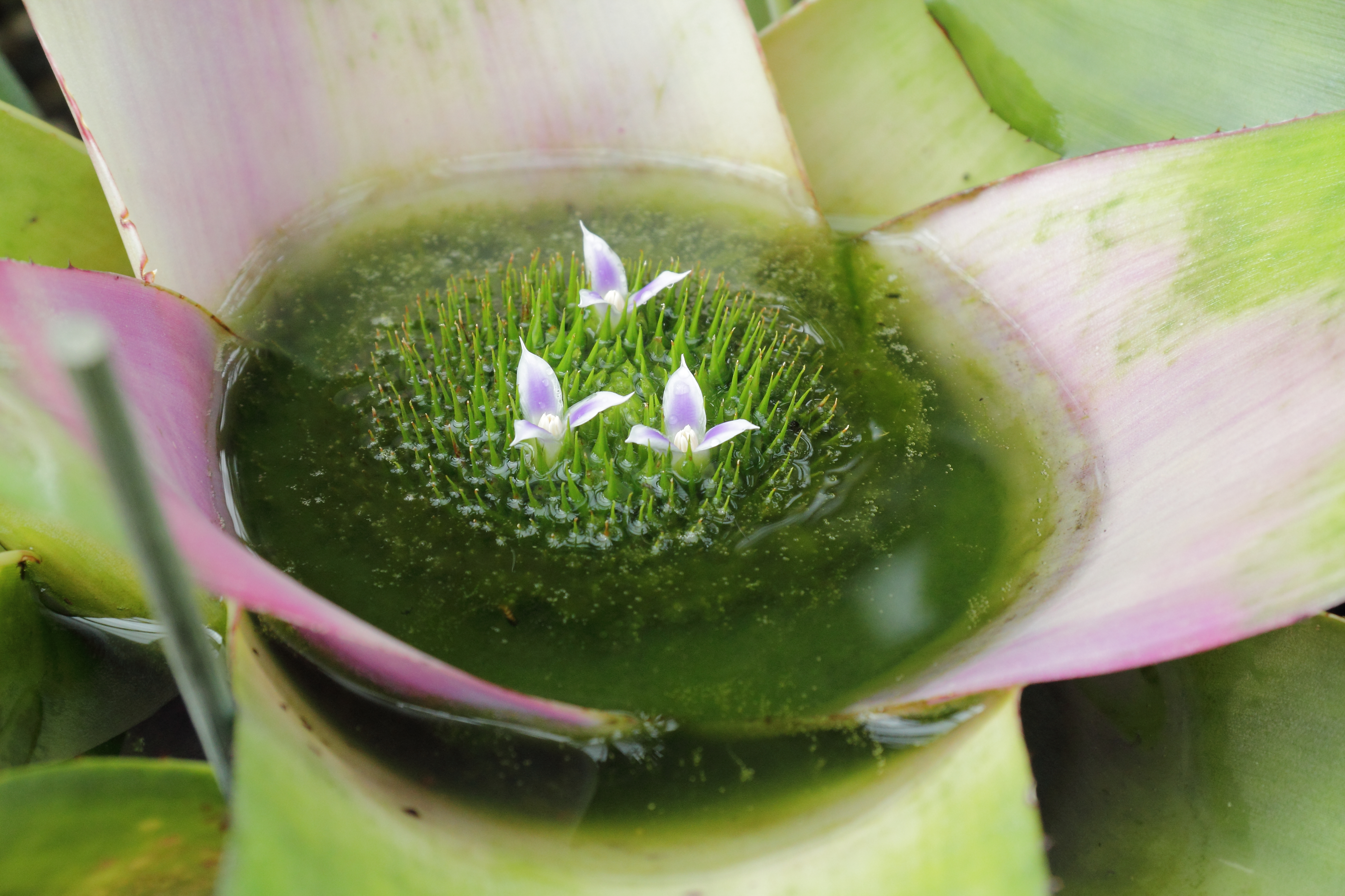 Neoregelia concentrica i Kew Gardens, London.